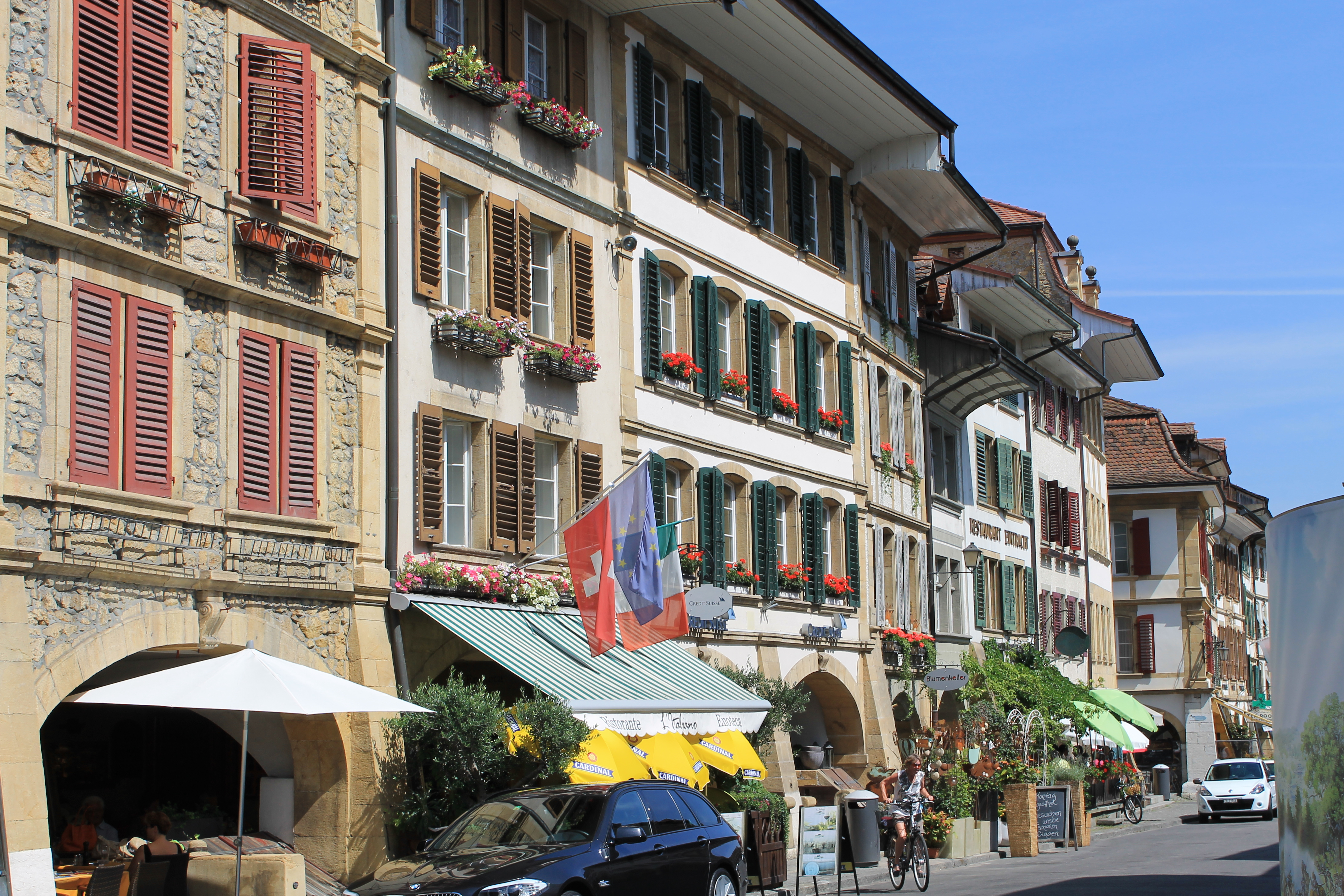 Morat